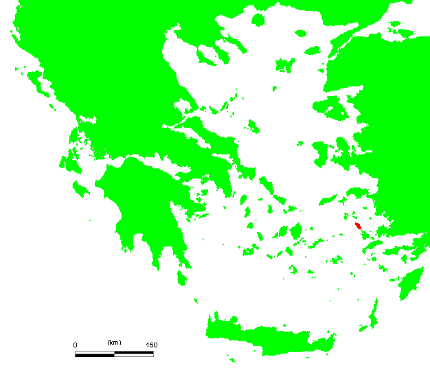 GR Leros.PNG (Greek island)